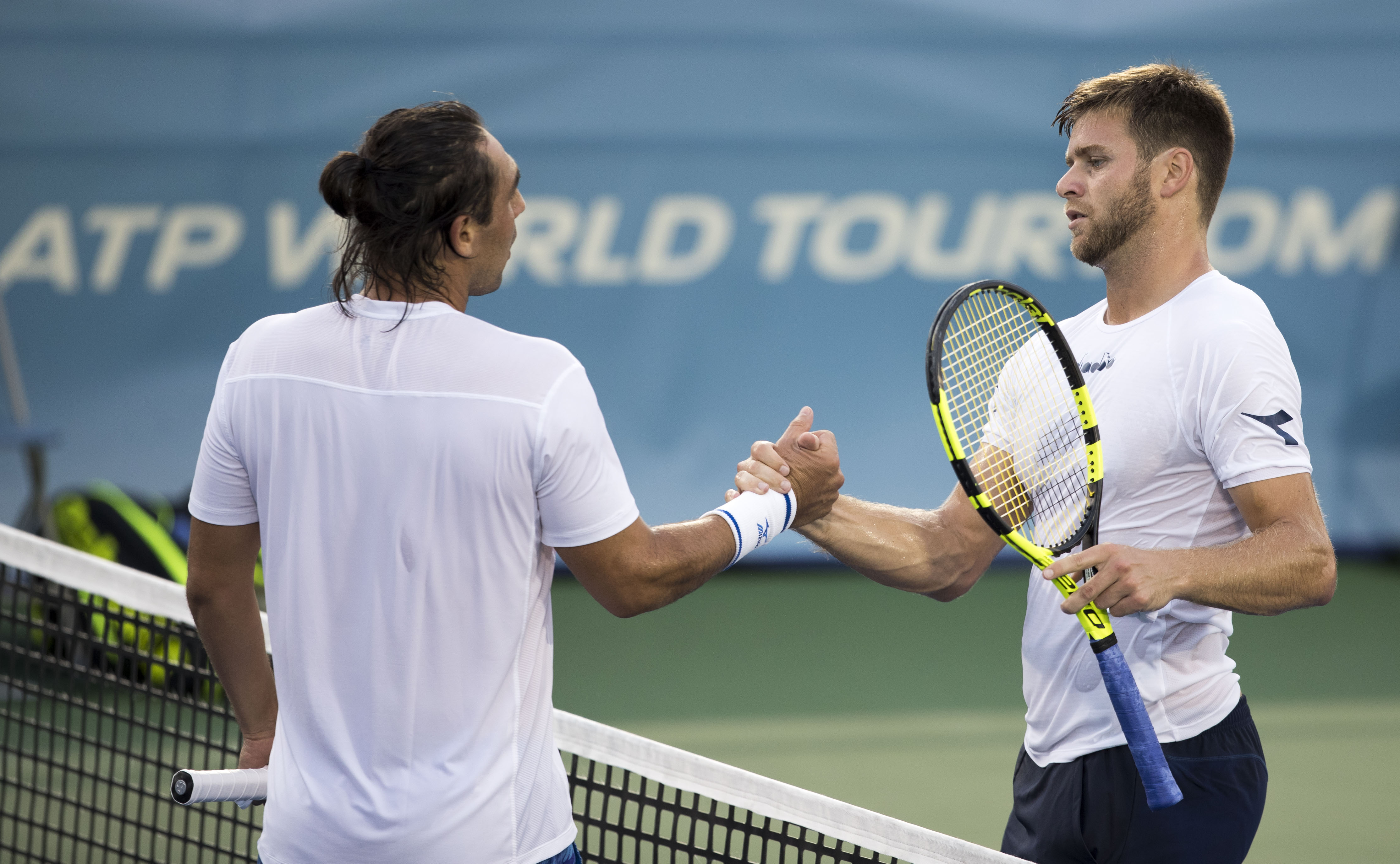 Citi Open Tennis 2017